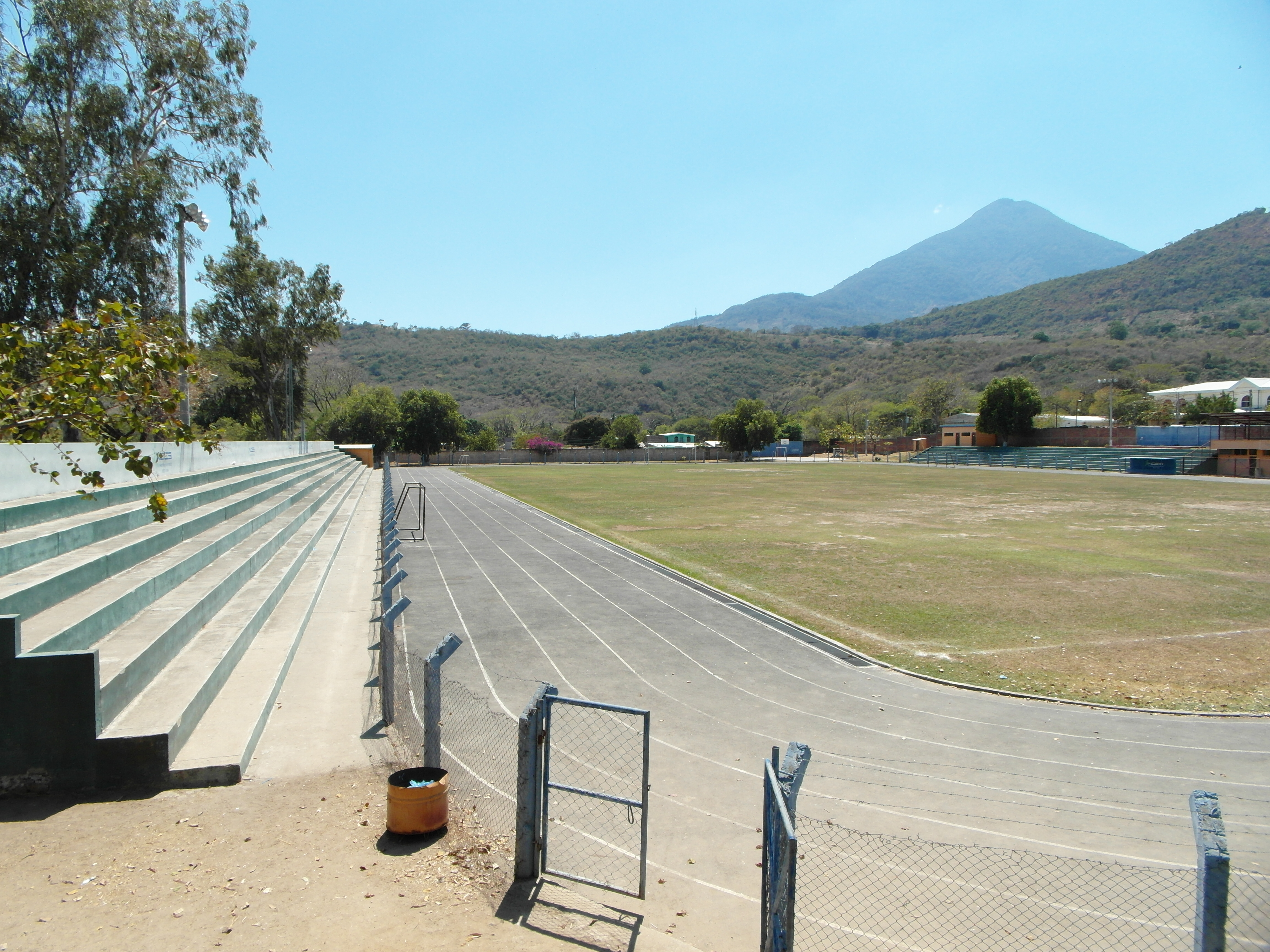 Graderios del estadio